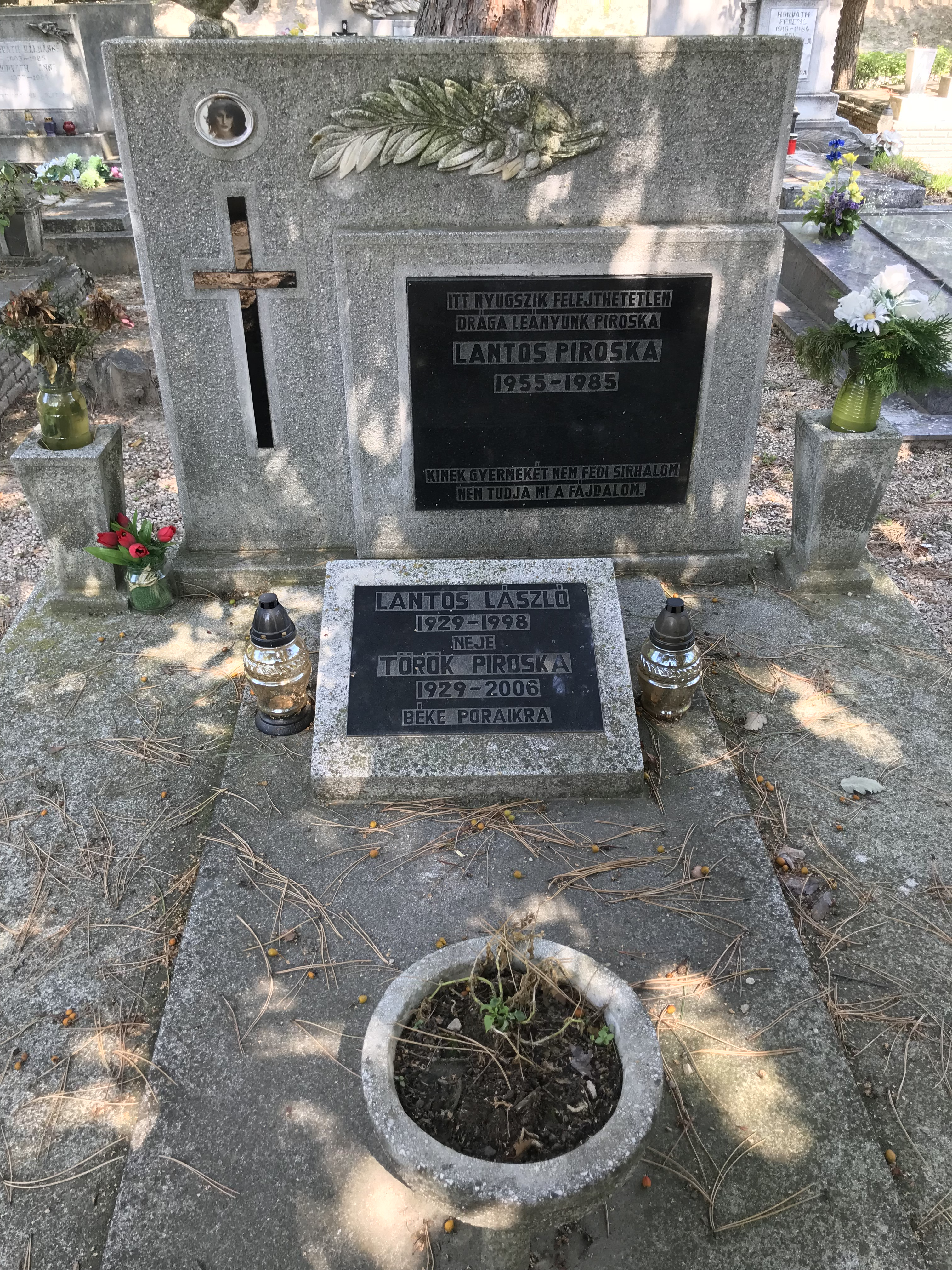 Lantos Piroska síremléke, Béla úti új köztemető, Székesfehérvár I. parcella, B1/4.sor 3.